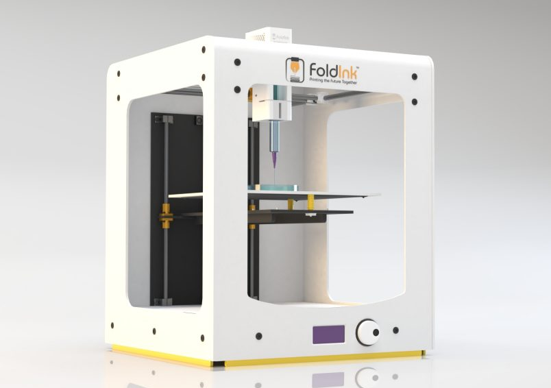 Հայկական Ֆոլդինկ ընկերության եռաչափ բիոպրինտեր